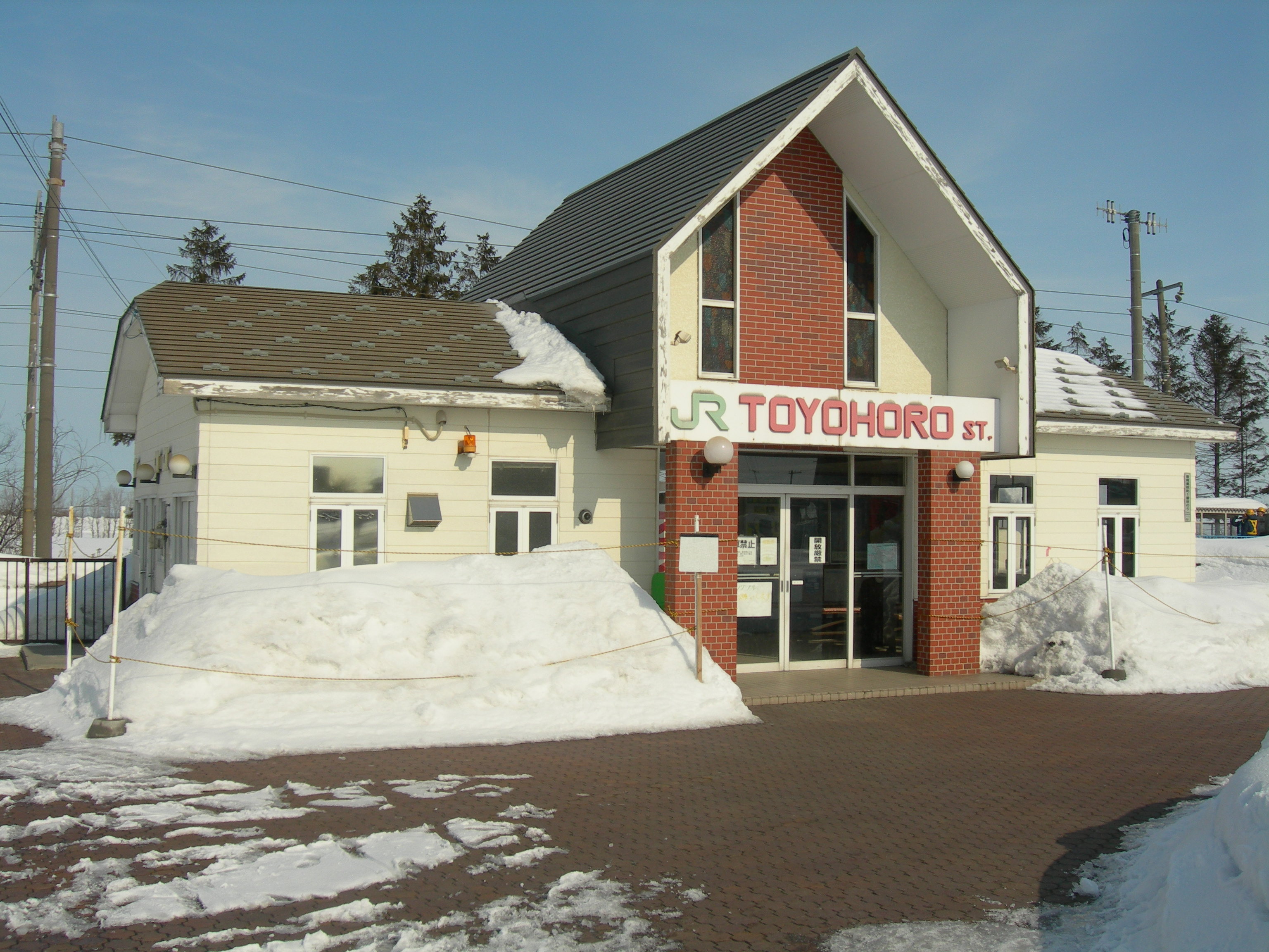 豊幌駅